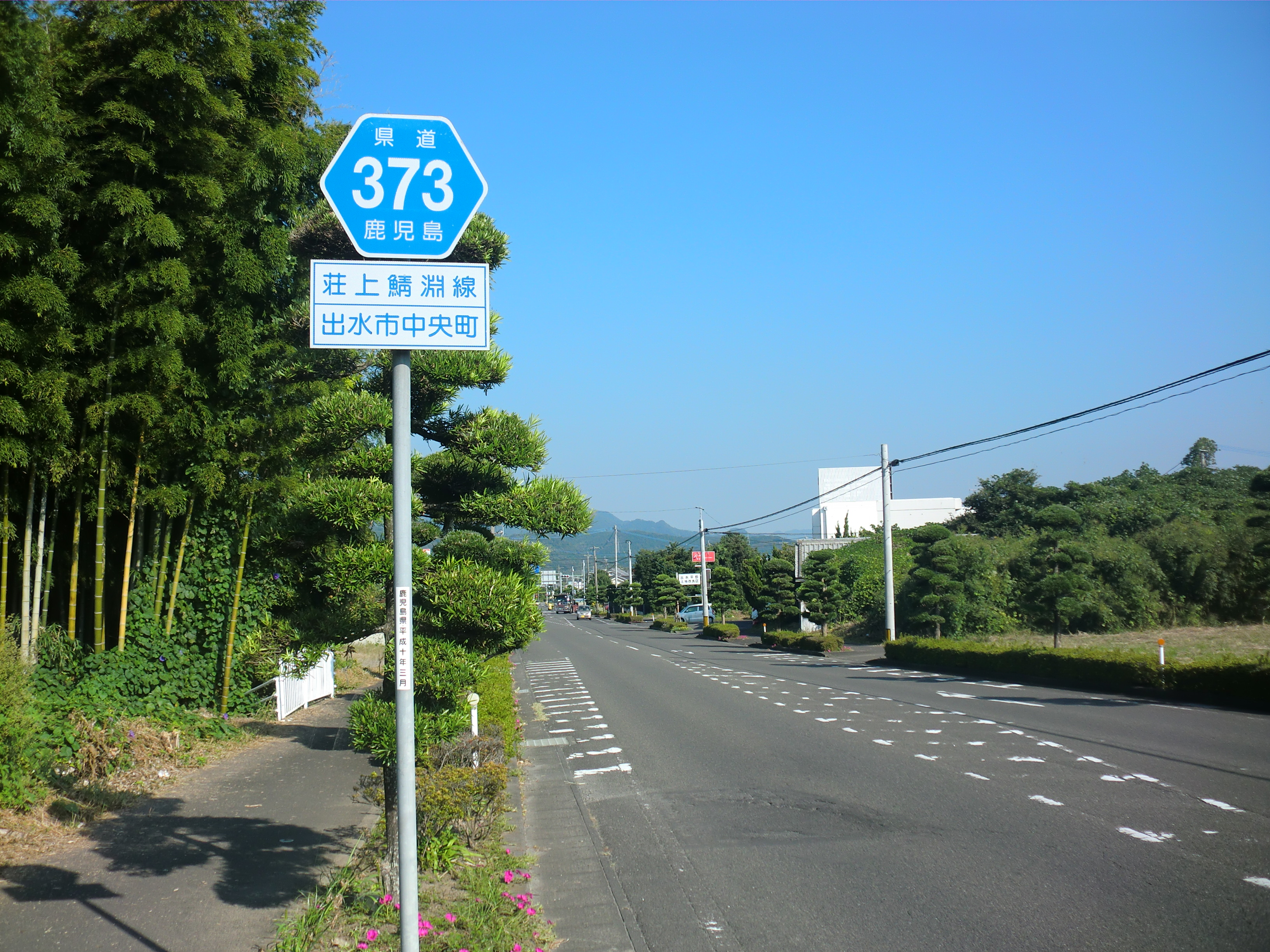 鹿児島県道318号線荘上鯖淵線（出水市中央町で撮影）